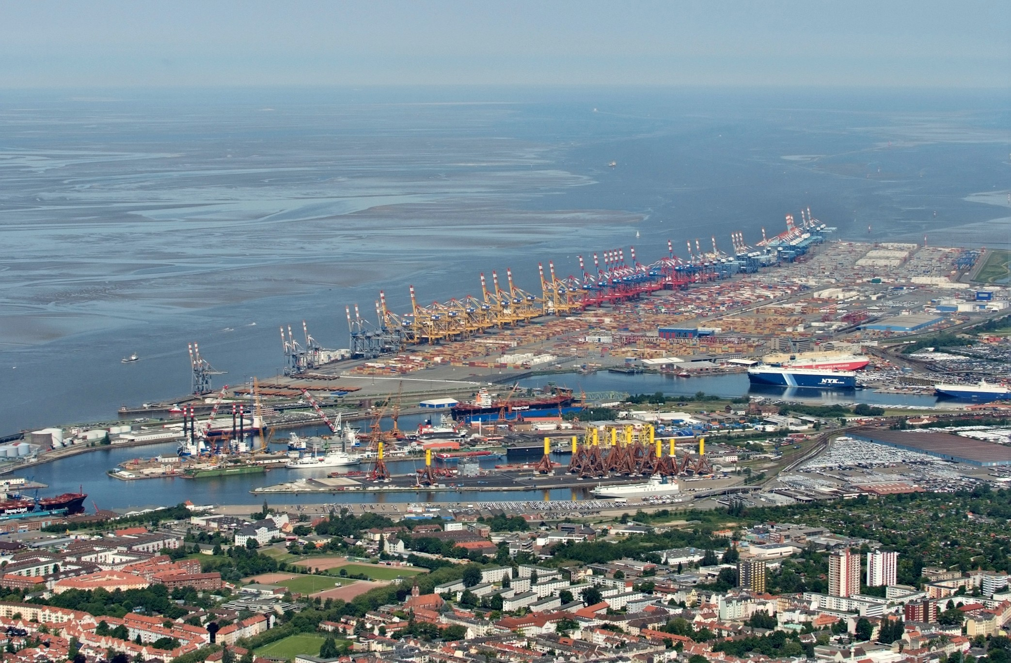 Fotoflug vom Flugplatz Nordholz-Spieka über Cuxhaven und Wilhelmshaven Der "Bremer-Hafen" in Bremerhafen, Blick von Südost, unten der Kaiserhafen, rechts oben der Nordhafen, links hinten die Stromkaje